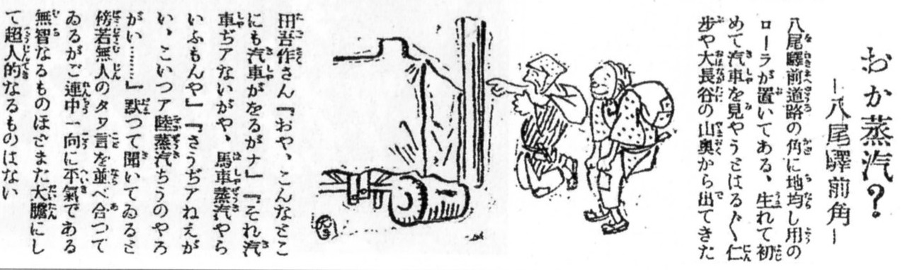 飛越線全通時のエピソード